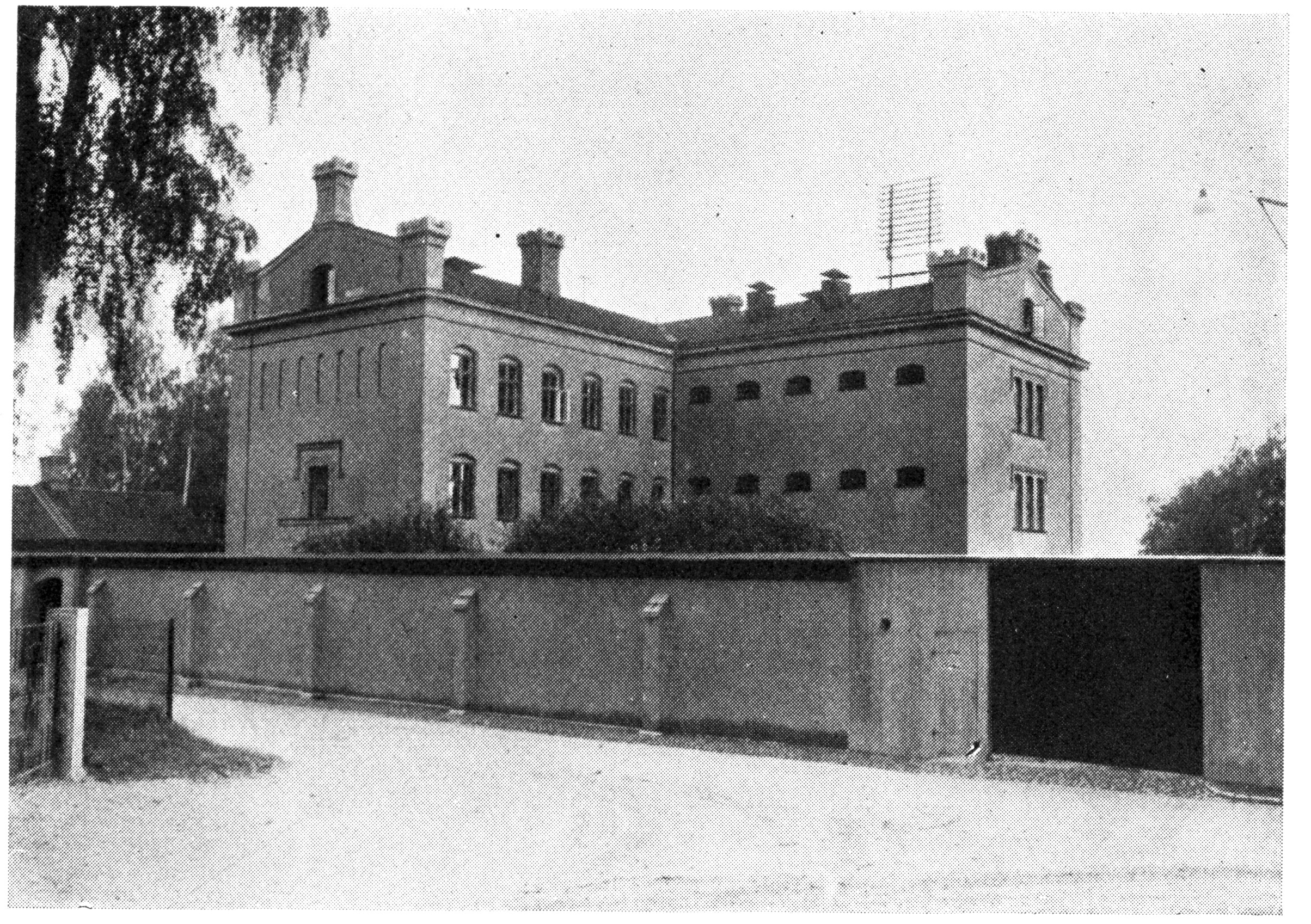 Länsfängelset i Falun